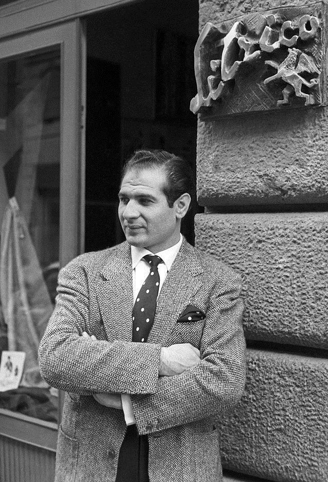 Italian fashion designer Angelo Litrico